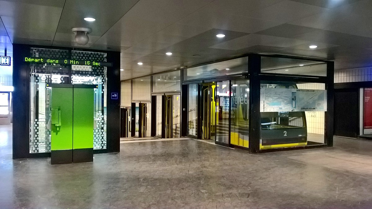 Station supérieure du Fun'ambule de Neuchâtel